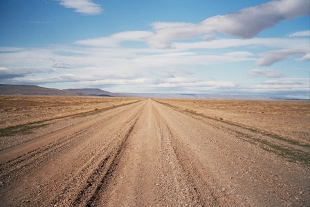 Pampa patagonica argentina